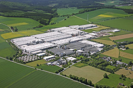 Firmenaufnahme / Luftbild MeisterWerke Schulte GmbH